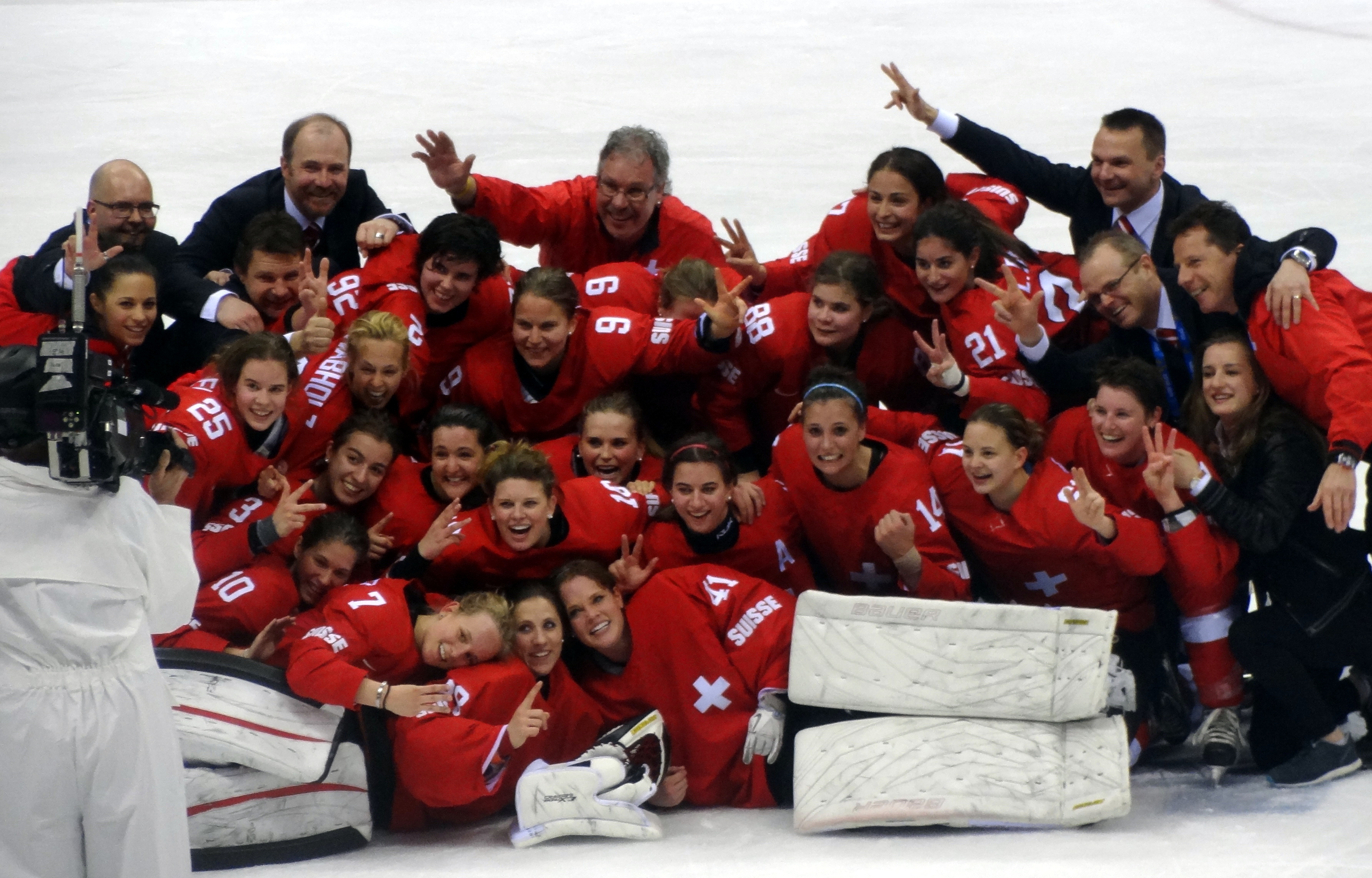 XXII Олимпийские зимние игры. Сочи, 20 февраля Хоккей. Женщины. За третье место. Швеция – Швейцария – 3:4 (1:0, 1:0, 1:4).